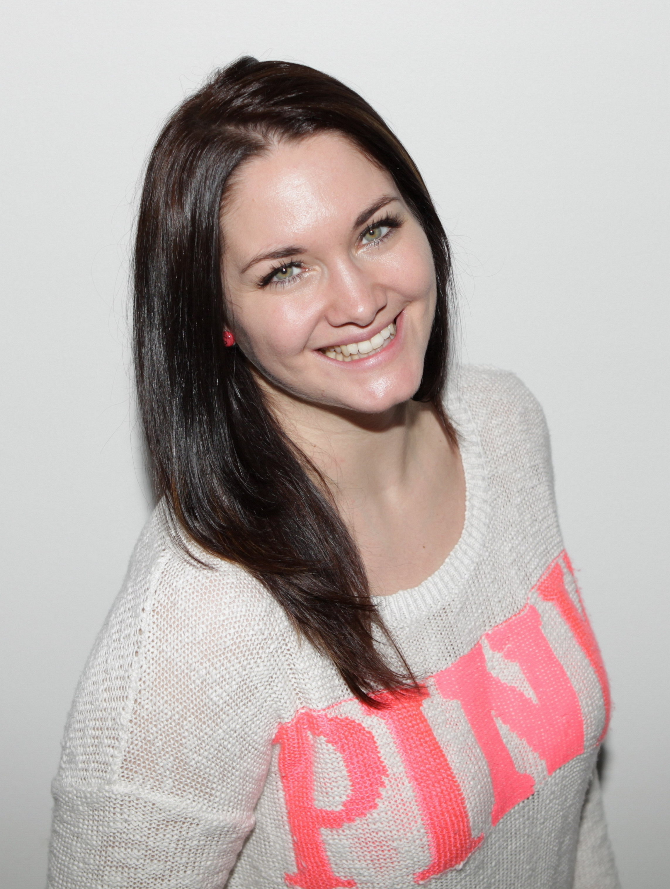 Gabi Hiller cropped